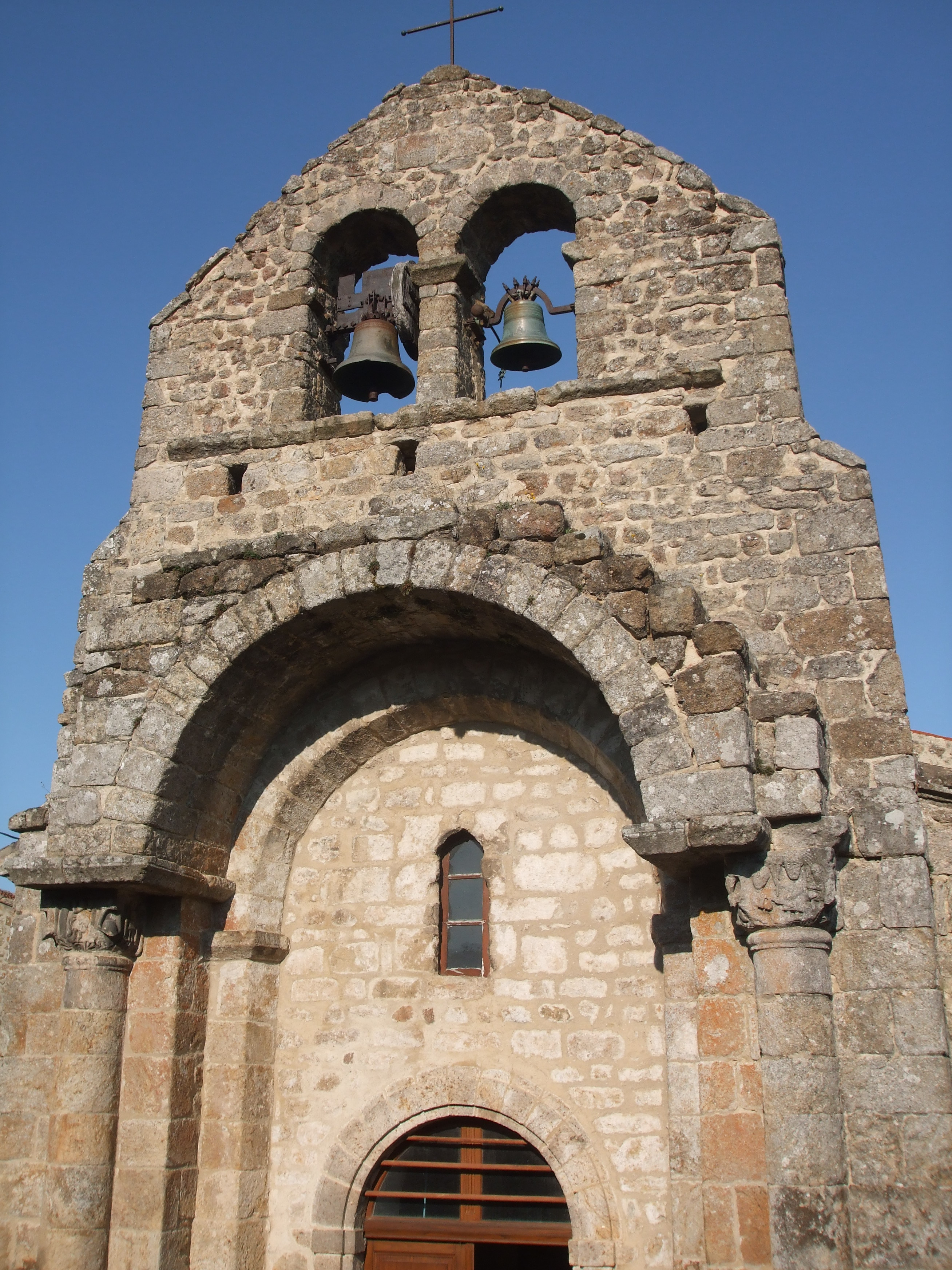 Église Saint-Pierre du Monteil, Le Monteil (Inscrit, 1974) .